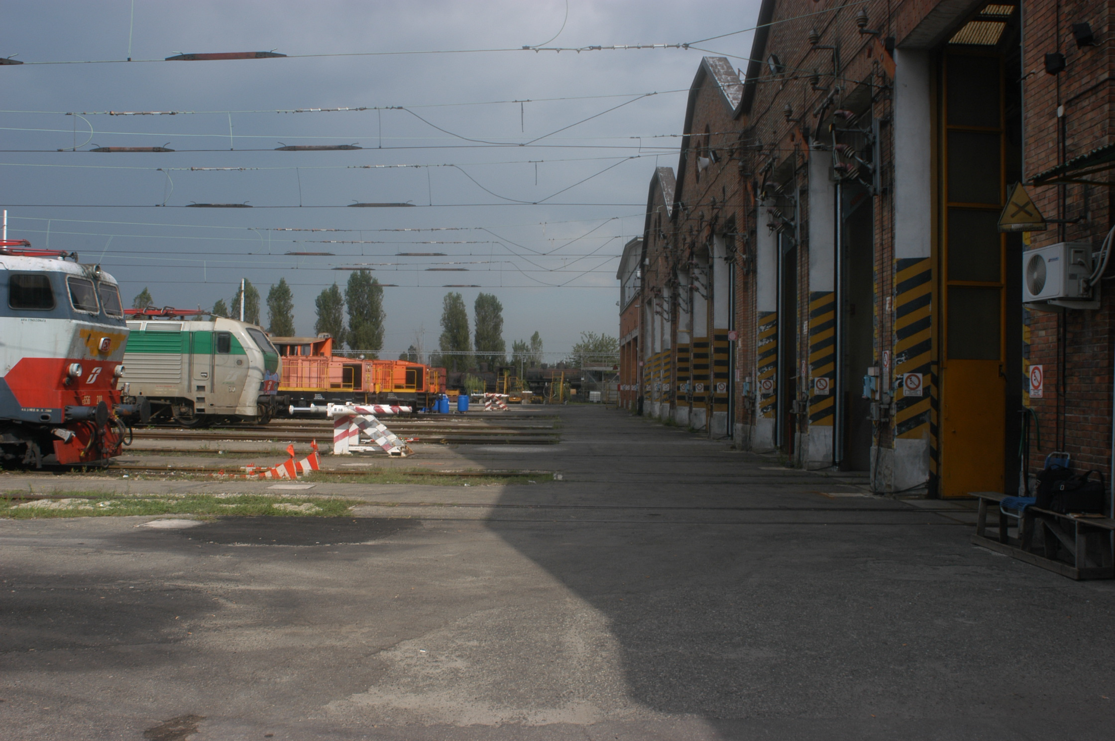 Deposito Locomotive presso Bologna San Donato